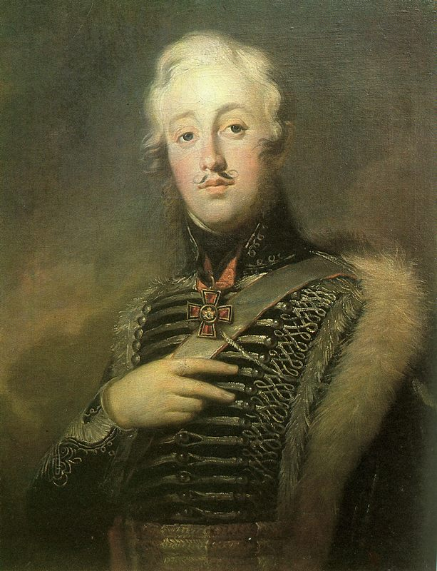 Петр Федорович Глебов-Стрешнев (1773-1807) (по атрибуции В. Старка )